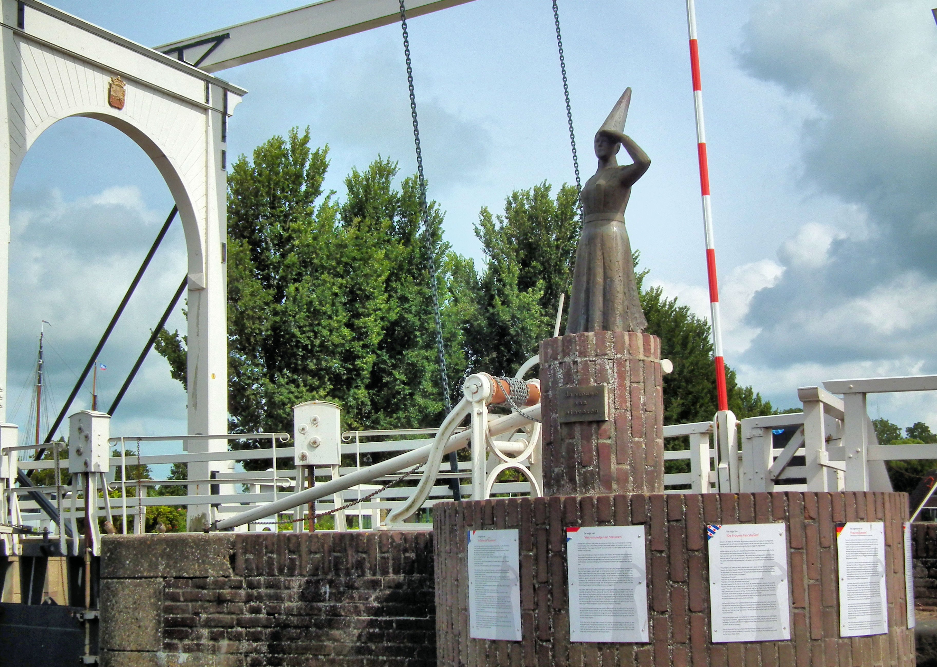 Nederland - Friesland - Stavoren - Stavoren is Hanzestad en Frieslands oudste stad. Pittoreske grachtjes. Een aantal fraaie panden.